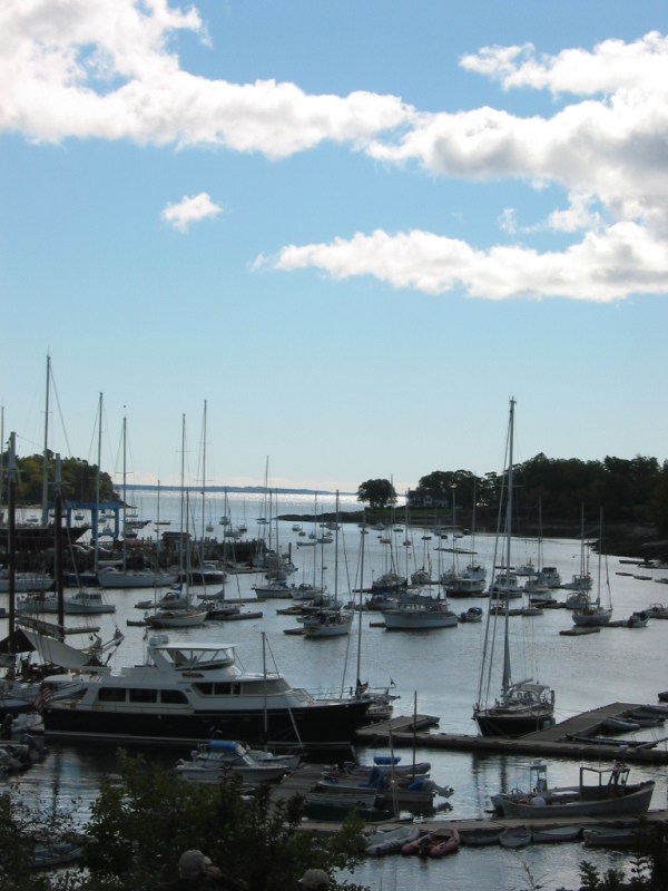 Camden, Maine